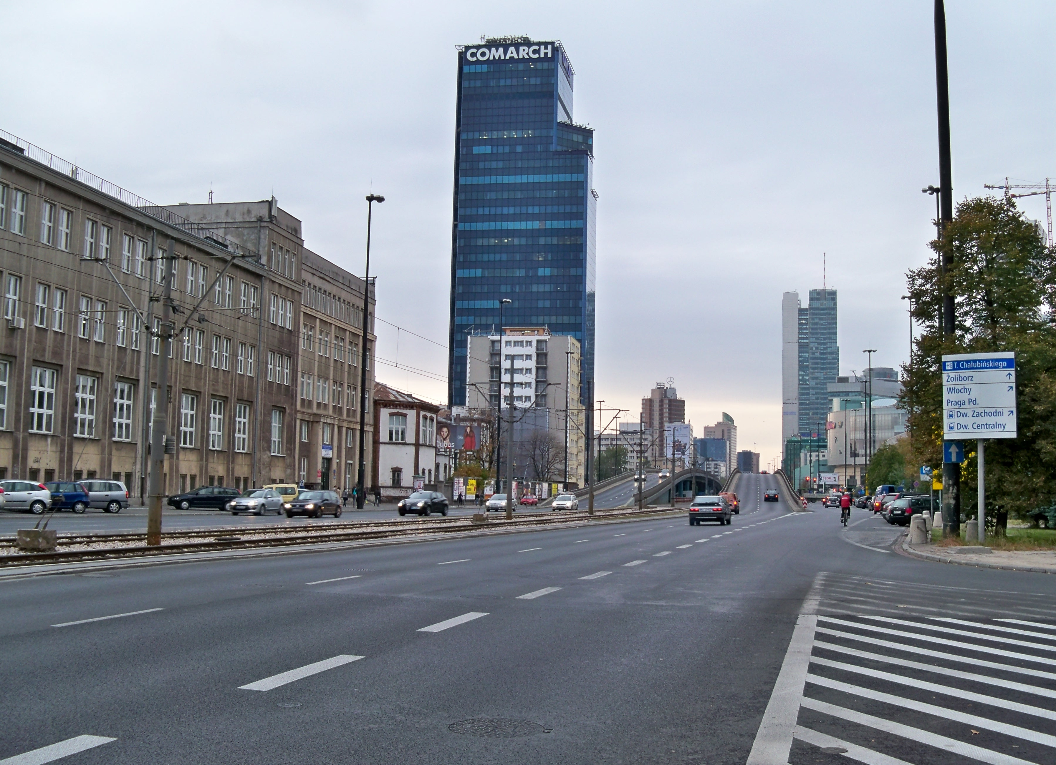 Wiadukt nad Alejami Jerozolimskimi tworzony na przejściu ul. T. Chałubińskiego w Al. Jana Pawła II. Warszawa – styk granic Ochoty, Woli i Śródmieścia. Na pierwszym planie ul. Chałubińskiego, z prawej wlot ul. Wspólnej, z lewej budynki Warszawskiego Uniwersytetu Medycznego. W centrum Orco Tower.